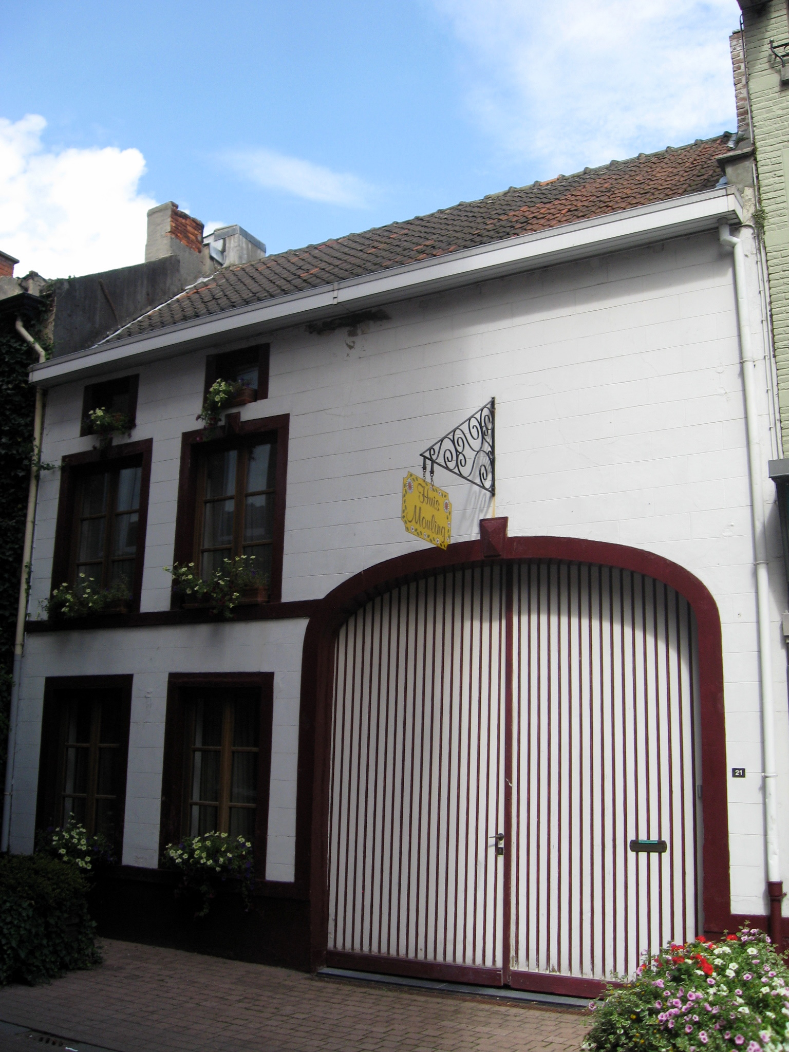 Huis Het Zonneke, voormalige stadshoeve in Hasselt